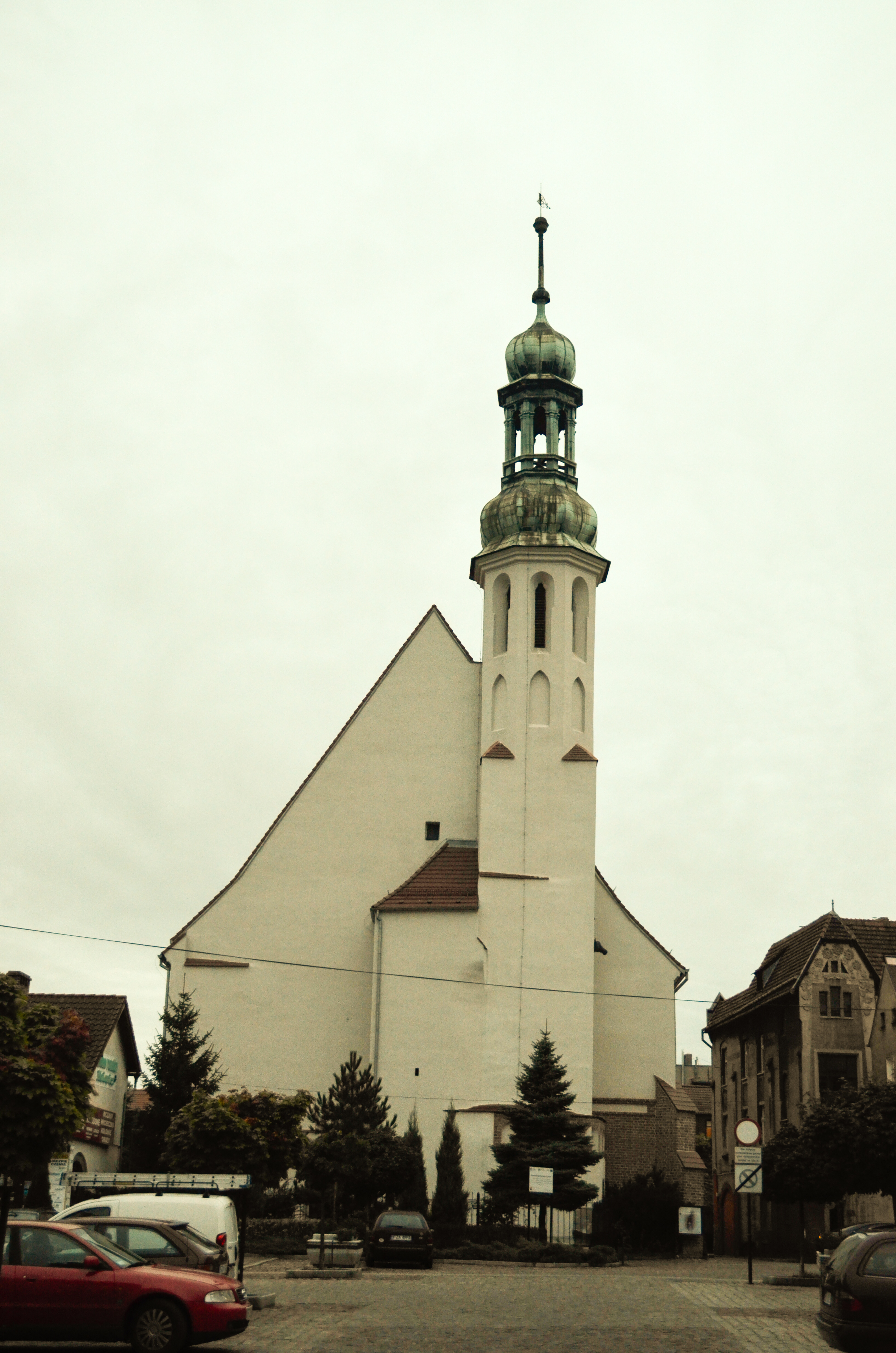 Żary, kościół p.w. św. Barbary, ob. garnizonowy p.w. Podwyższenia Krzyża, XIV/XV, XVIII